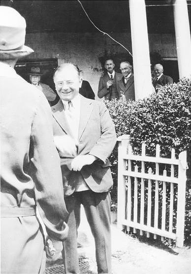 Portrait of Leopold Amery, Secretary of State for Dominion Affairs smiling towards a woman during his visit to Australia, 1927-1928 רישיון על פי [1]